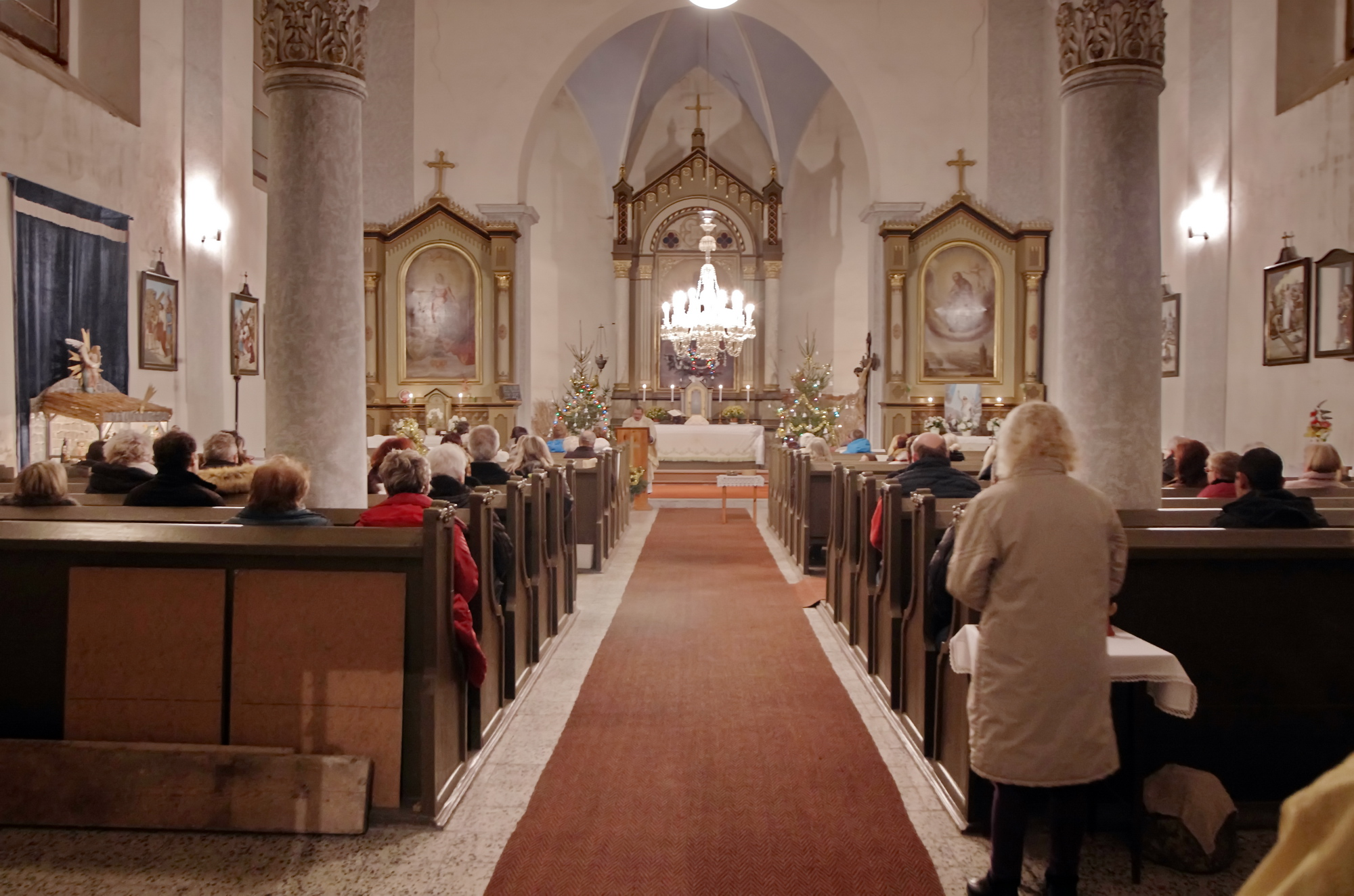 Staré Sedlo kostel Nejsvětější Trojice, okres Sokolov